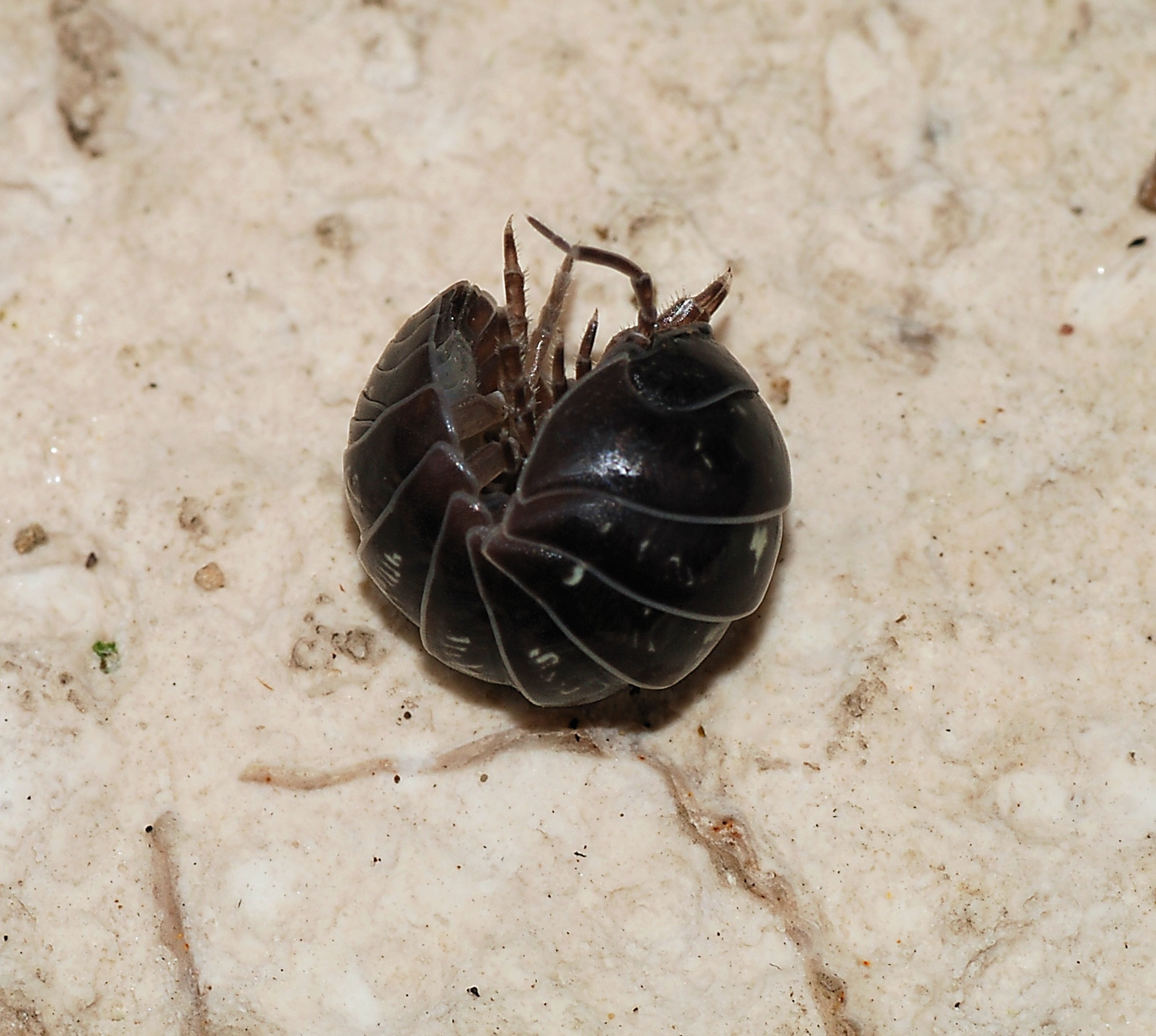 A woodlouse (Armadillidium vulgare)